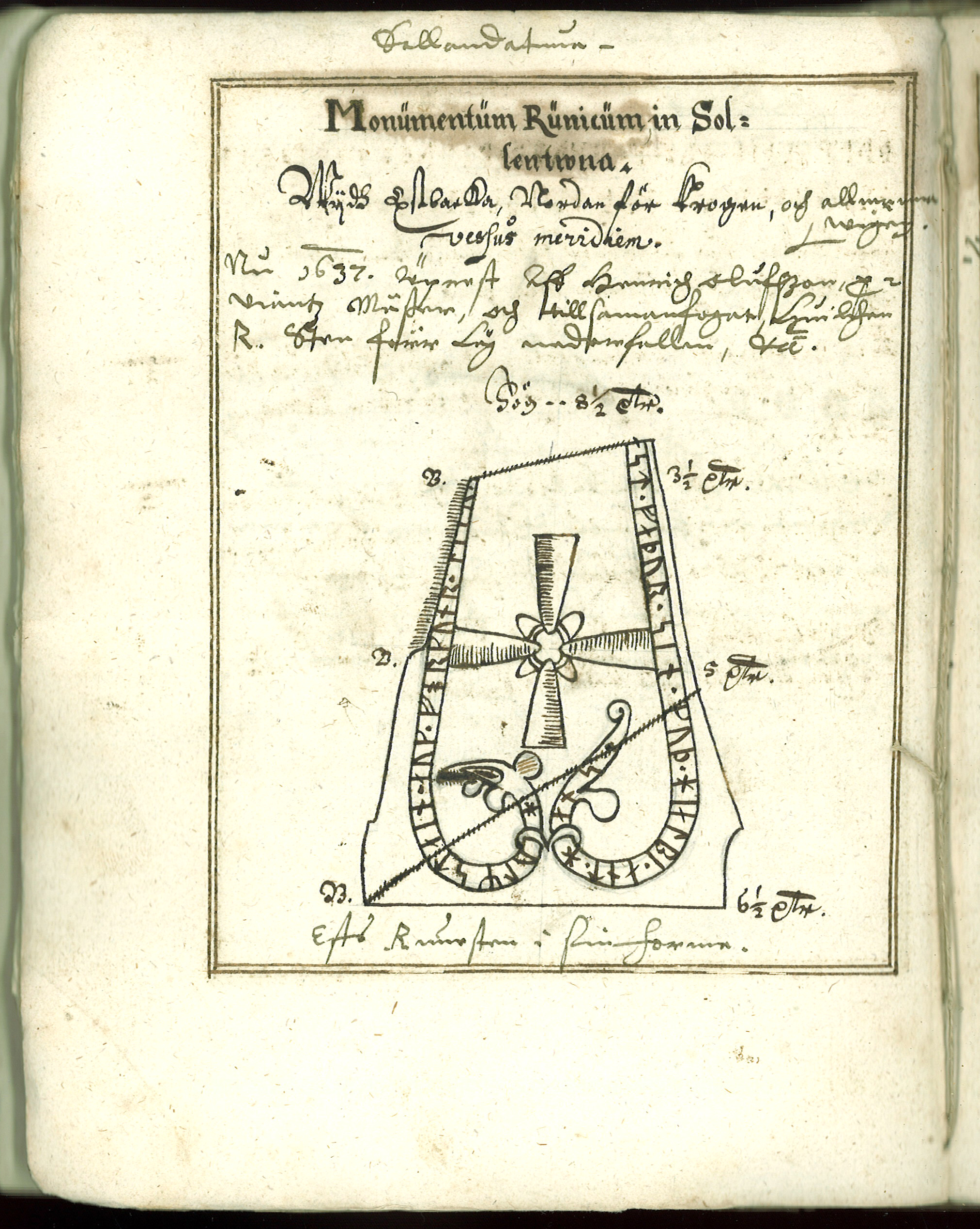 Runsten (U 96) som på 1600-talet låg kullvält vid Edsbacka, Sollentuna sn. Stenen har sedan dess flyttats, och 1926 fanns endast fotstycket under sprickan kvar av stenen. Den finns nu uppsatt strax söder om allén till Edsberg. Inskrift: "Holmsten och Forkunn ... -fast, sin fader. Gud hjälpe hans ande. En annan avbildning av Aschaneus finns återgiven i Sveriges runinskrifter. Bd 6, Upplands runinskrifter, D. 1, 1940-1943. Källa: Stifts- och landsbiblioteket i Skara: MS Språkvetenskap 15, 30v